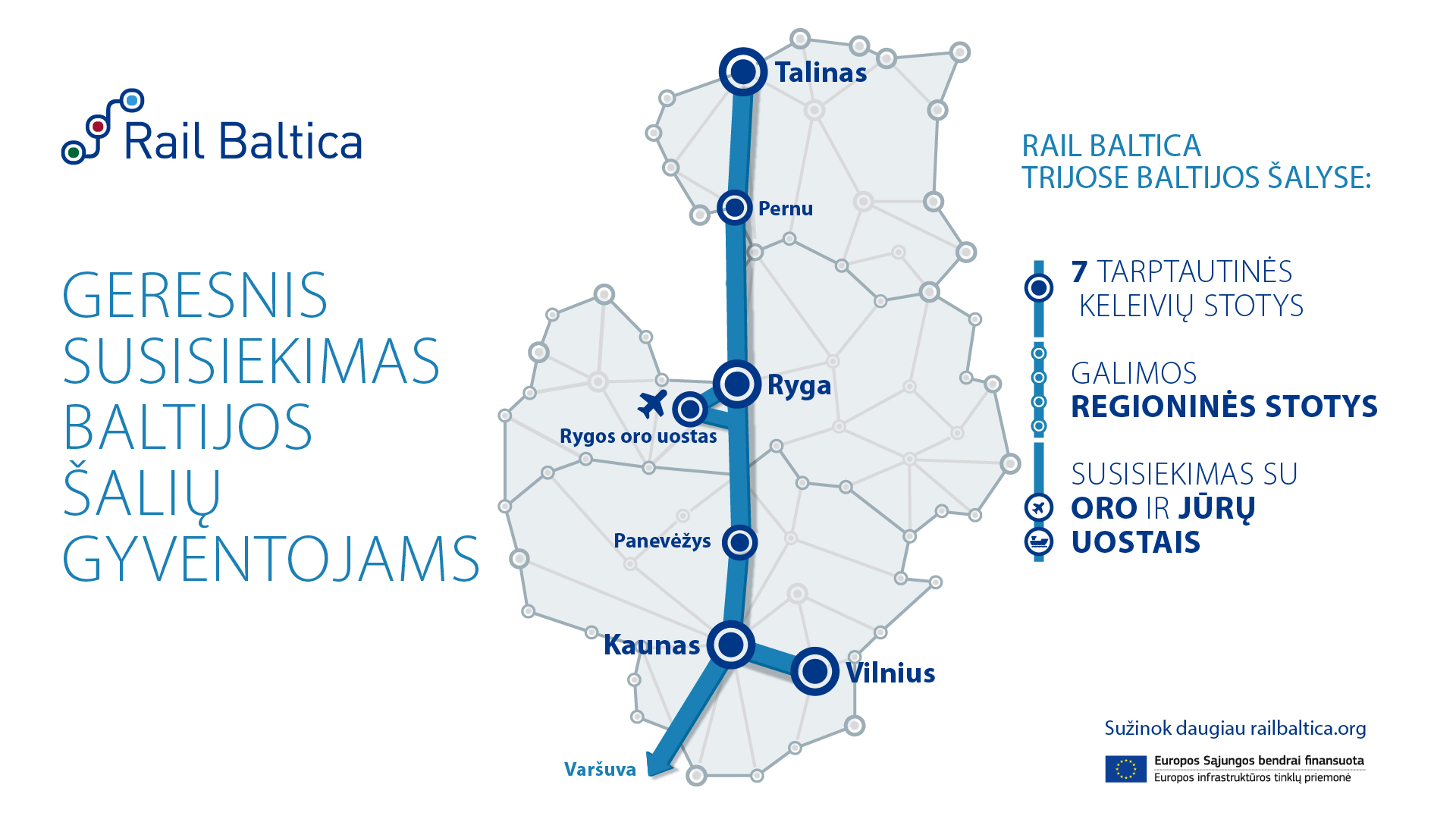 Rail Baltica stočių žemėlapis